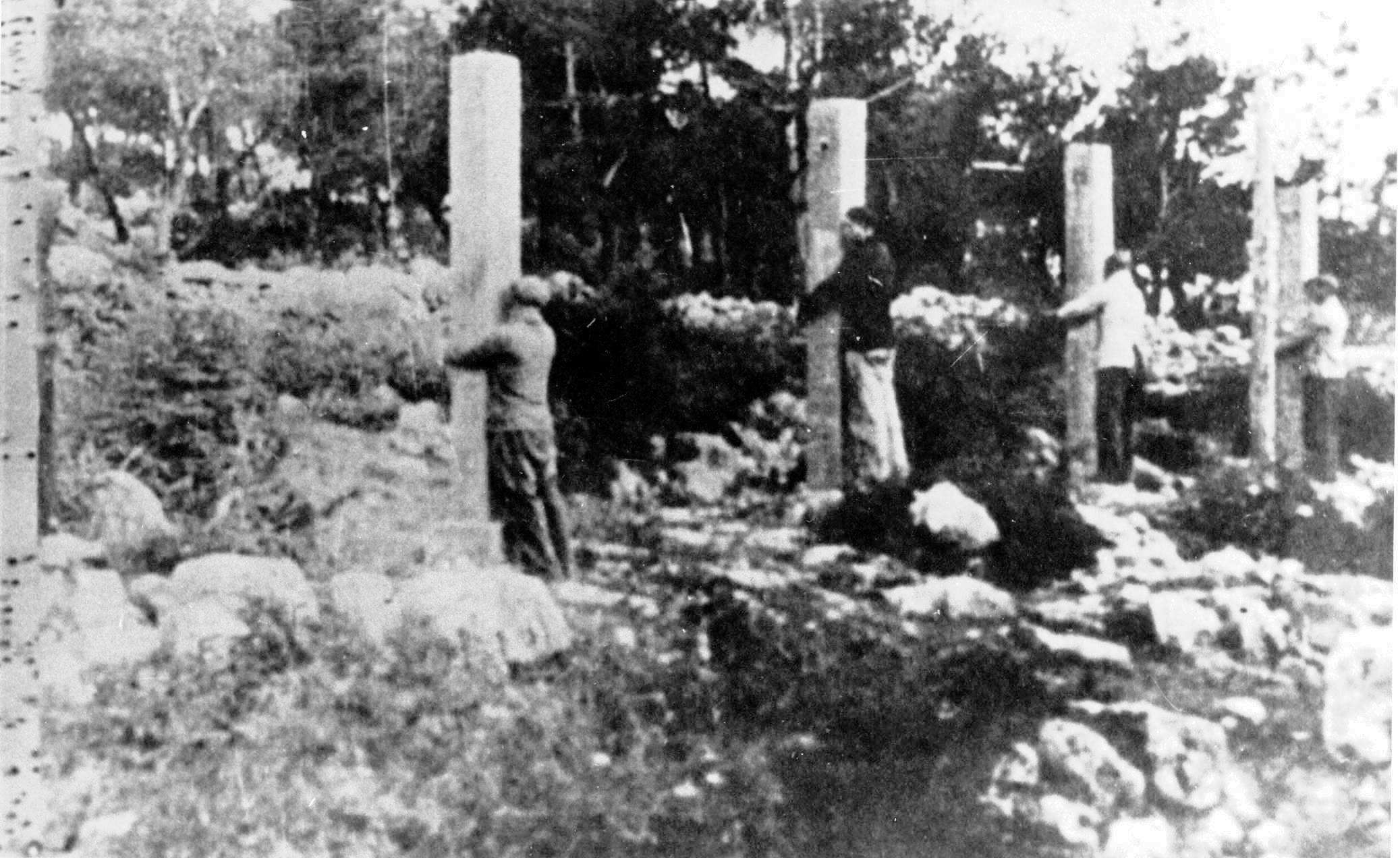 Srpskohrvatski / српскохрватски: Streljanje Rade Končara i drugova u Šibeniku 22. V. 1942.